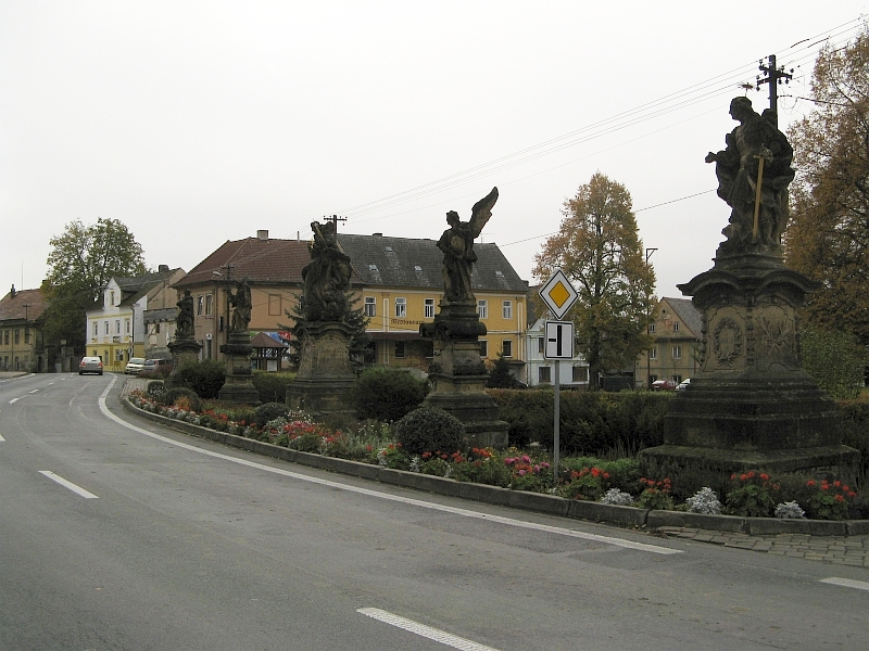 Sochy - soubor 5 soch (Liběšice), při silnici proti zámku, Liběšice